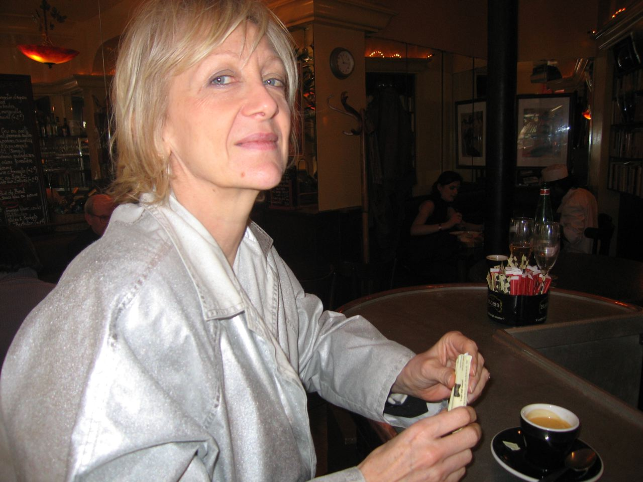 Pascale de Trazegnies à Paris en 2008